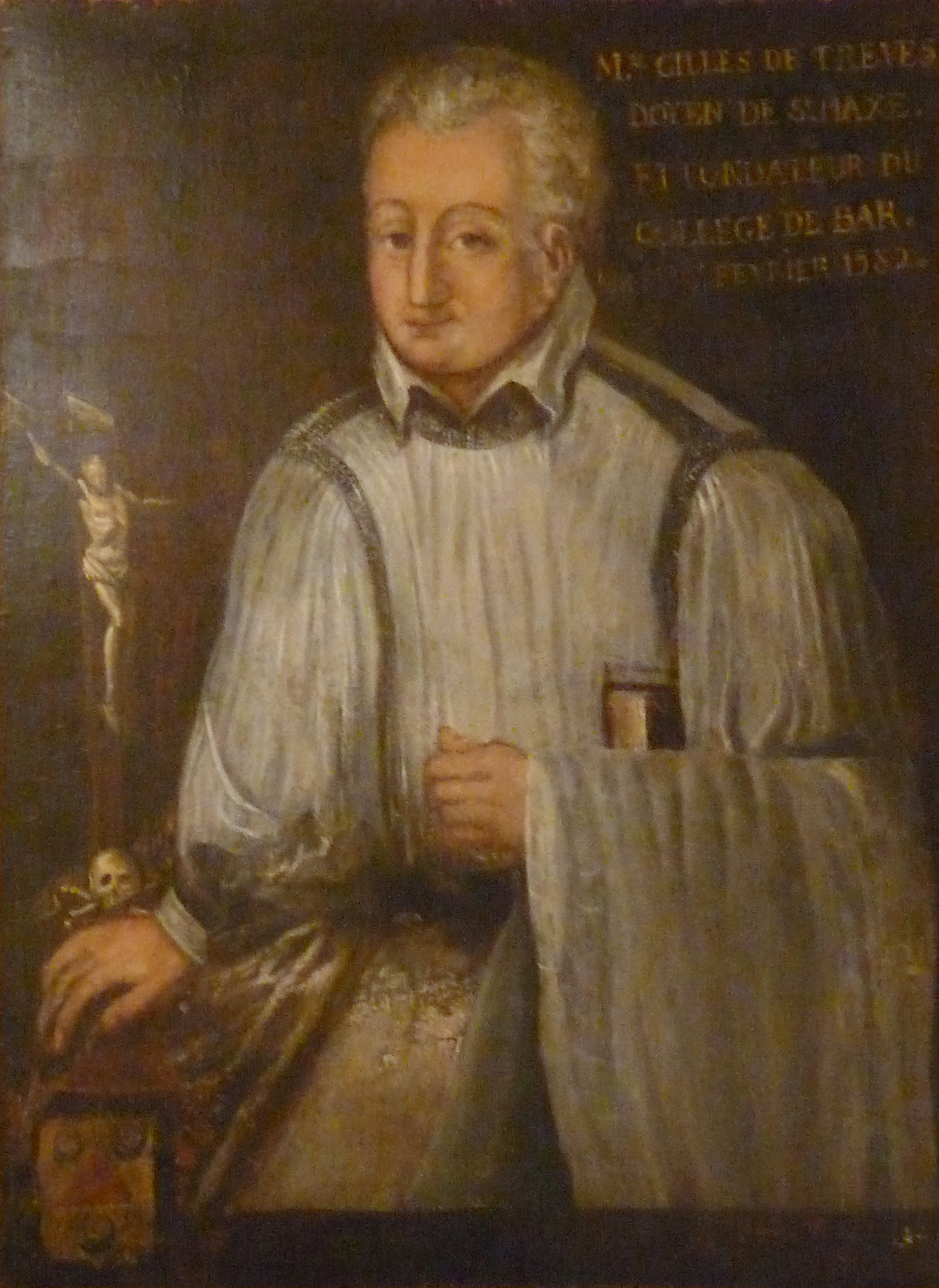 Ecole lorraine du XVIe s. Gilles de Trèves, 1582. Musée barrois